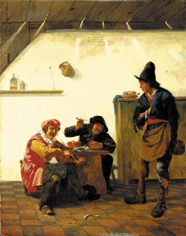 Peasants smoking and making music in an inn.